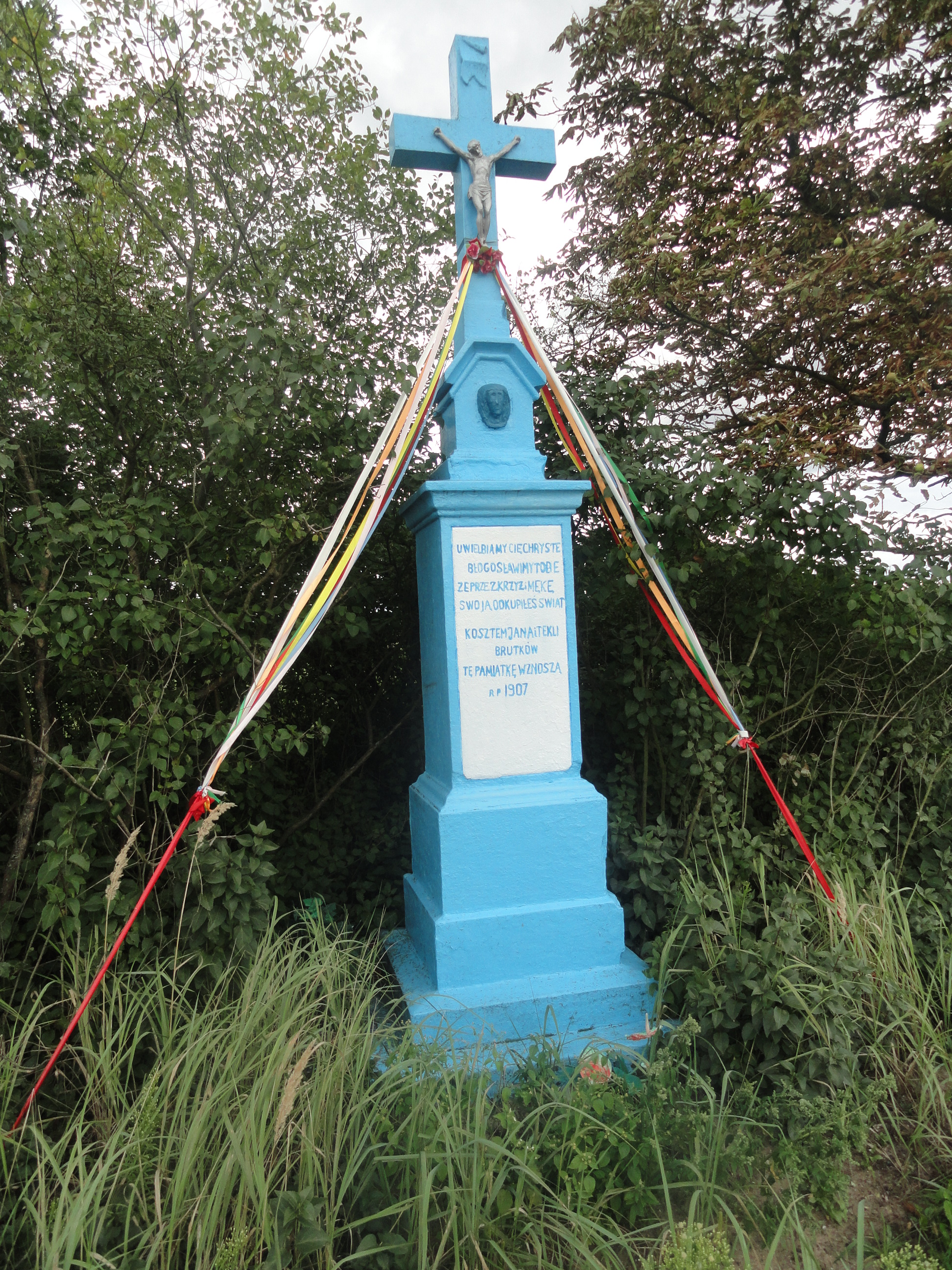 Przydrożna figura w Płudnicy koło Iłży.